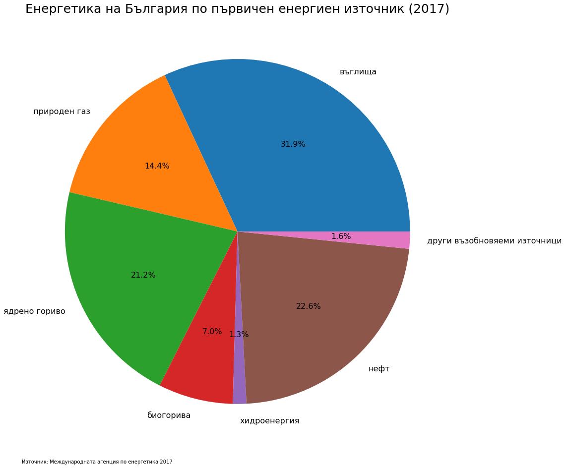 Енергетика на България по първичен енергиен източник